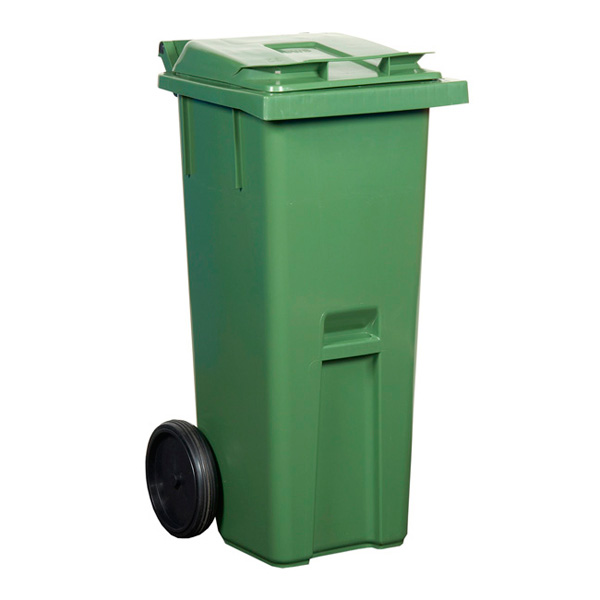 Søppelspann 140L